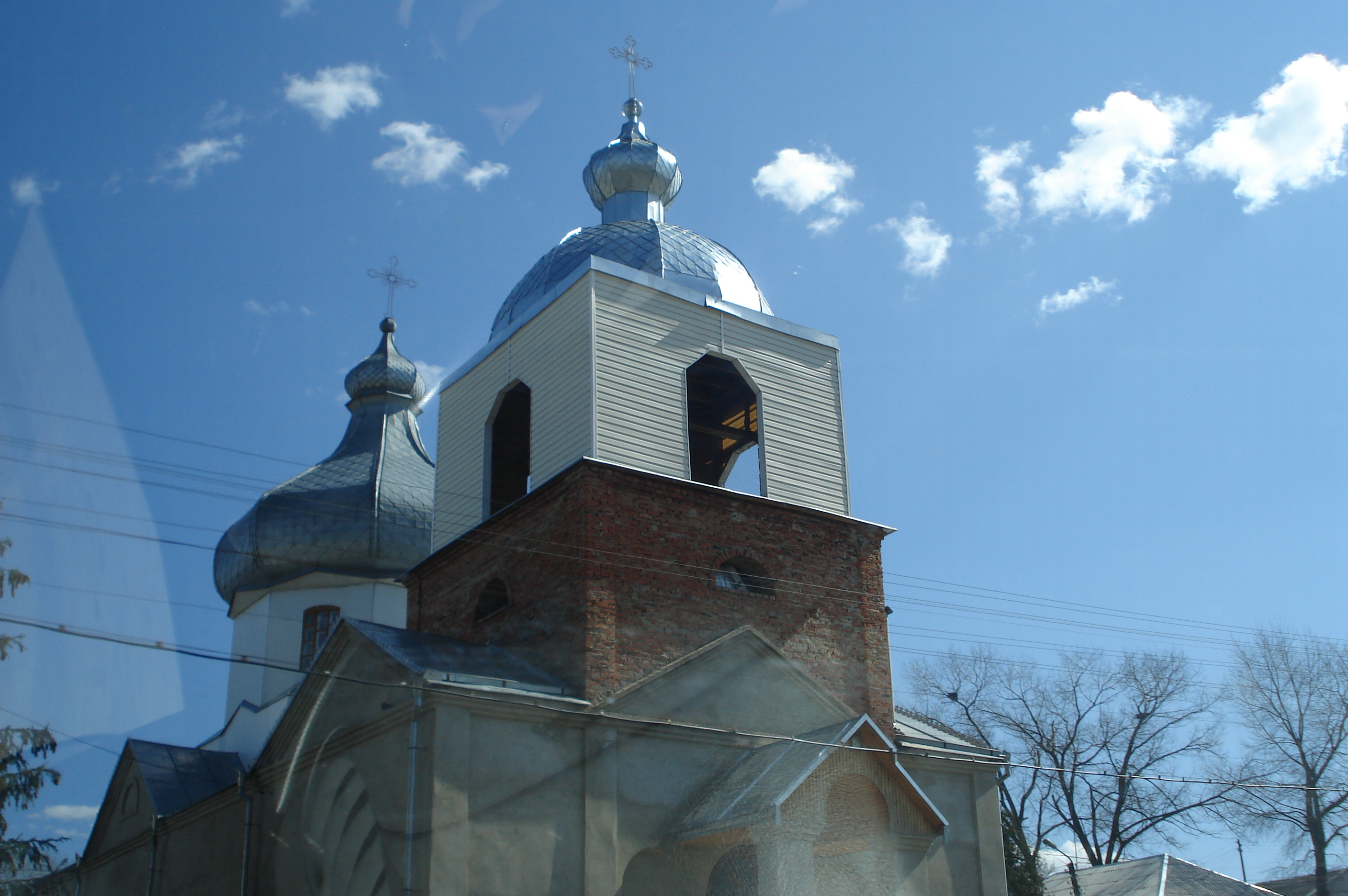 Церковь в Большом Солдатском